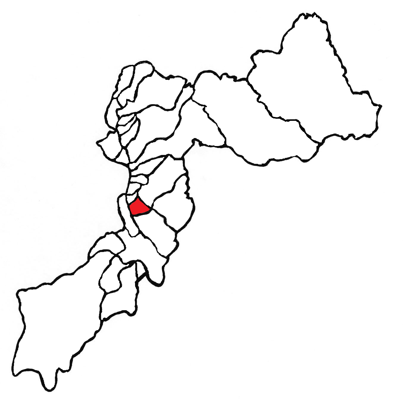 Ubicación del distrito en la provincia de Huancayo, departamento de Junín, Perú